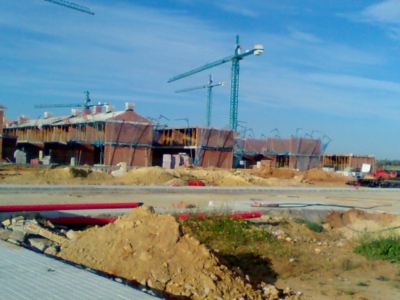 Comstrucción de viviendas familiares en Umbrete